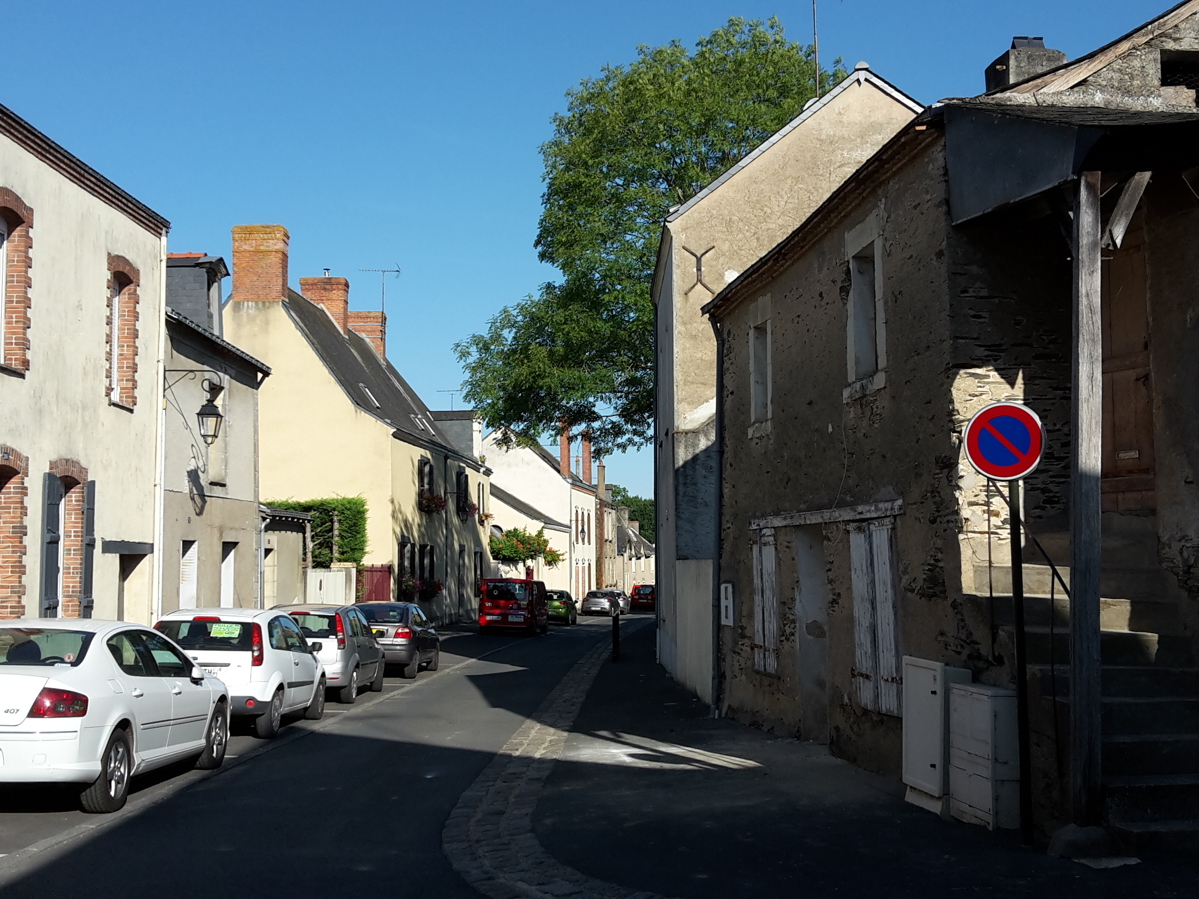 Rue Victor Lassalle, Candé, France.